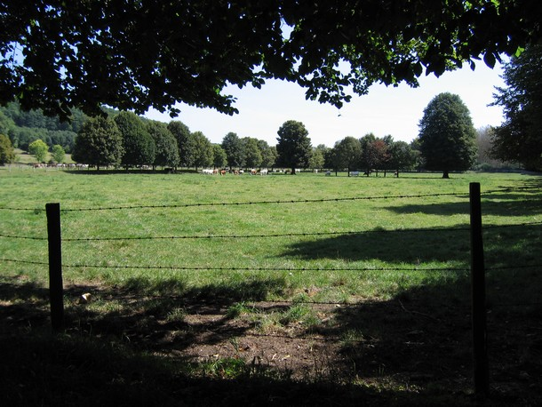 Le champs des moines de l'abbaye du Bec Hellouin, Eure, Haute Normandie, France